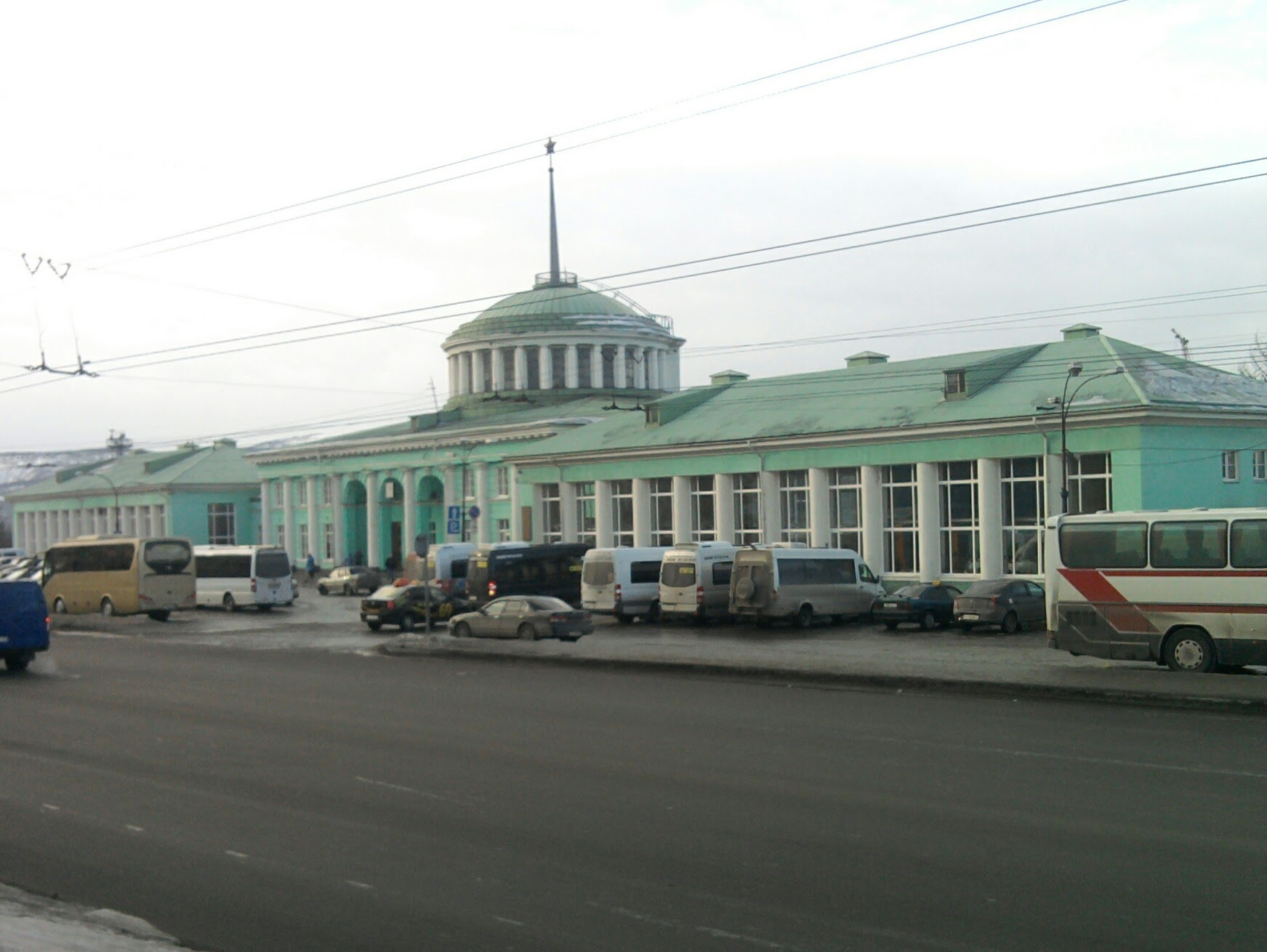 Здание железнодорожного вокзала: улица Коминтерна, 14, Мурманск, Мурманская область